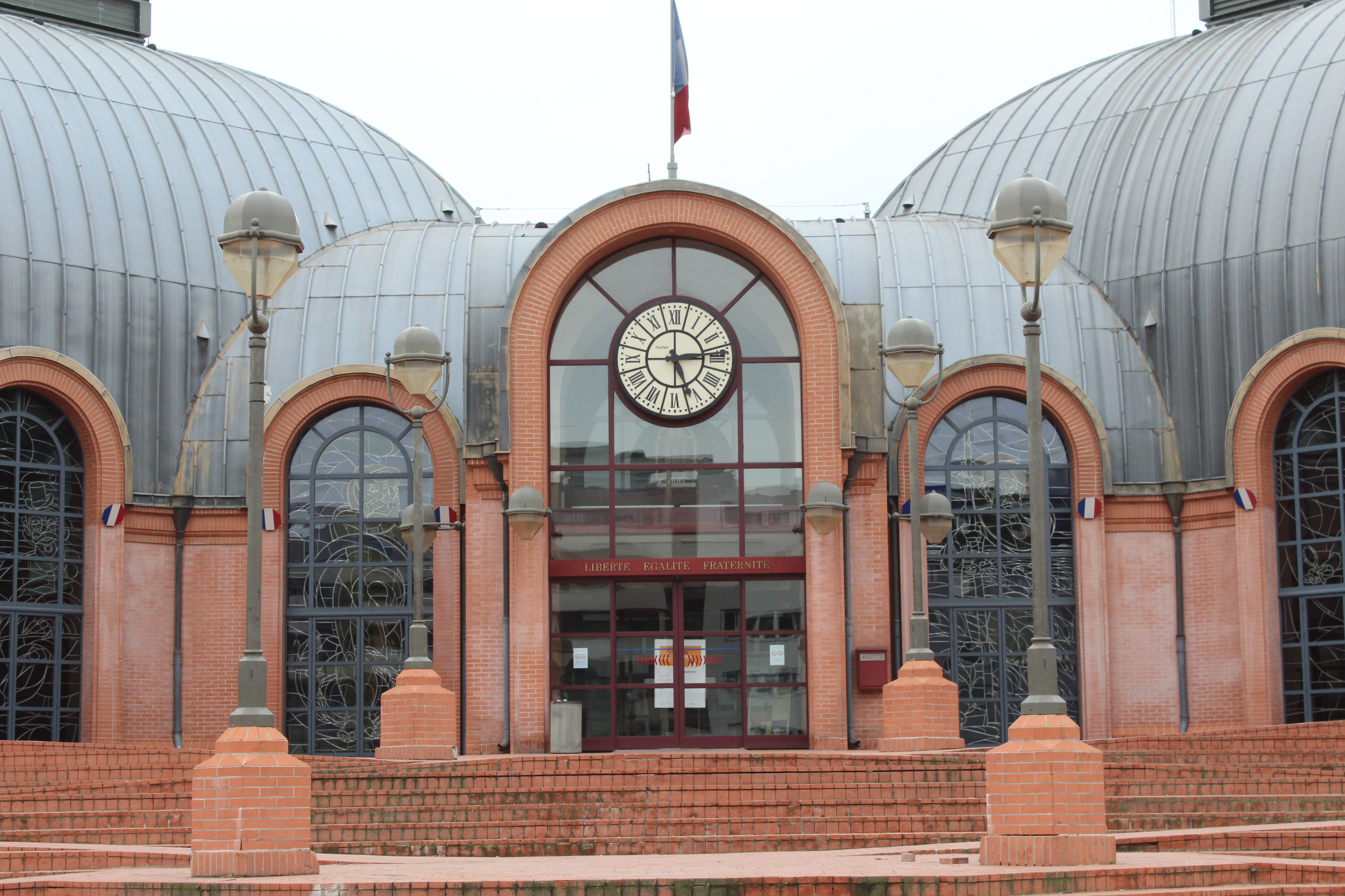 Hôtel de ville de Vitry-sur-Seine.